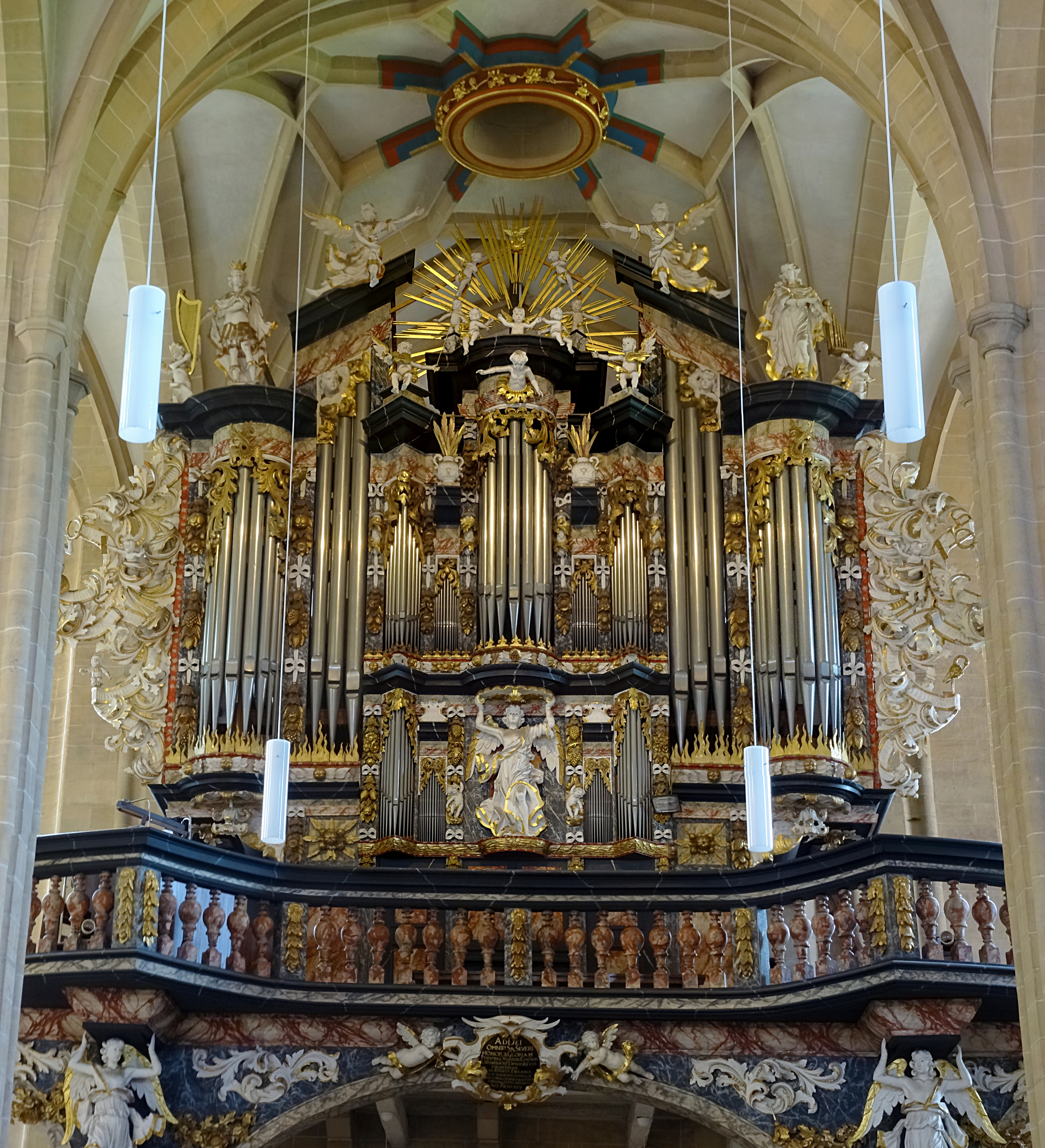 Klais-Orgel (1930) im Barockgehäuse von Wender (1714) in der Severikirche Erfurt [1]